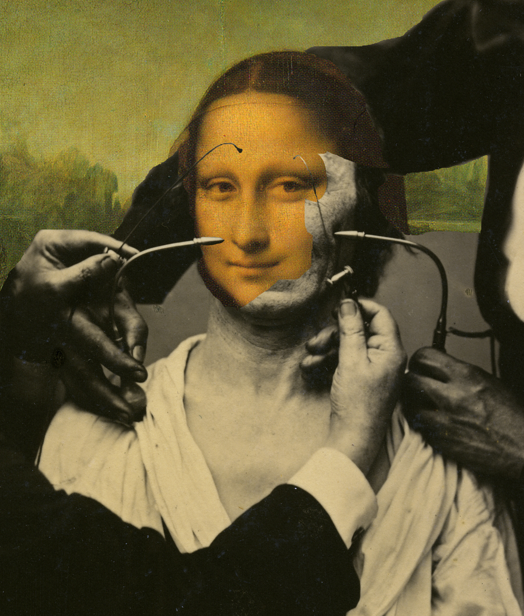 Emmanuel Fournier, "Duchenne de Vinci", 2009, collage pour la couverture du livre "La fabrique du visage", éditions Brepols, 2010